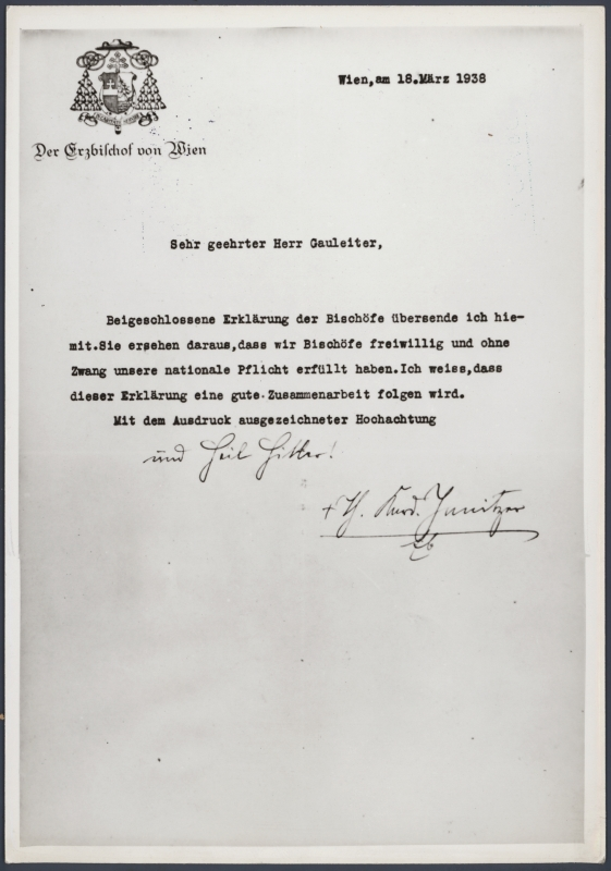 Erklärung von Kardinal Innitzer im Namen der katholischen Erzbischöfe Österreichs an die Gauleitung: Hinweis auf das Bekennerschreiben der katholischen Bischöfe Österreichs zum "Deutschen Reich" im Vorfeld der Volksabstimmung am 10. April 1938.